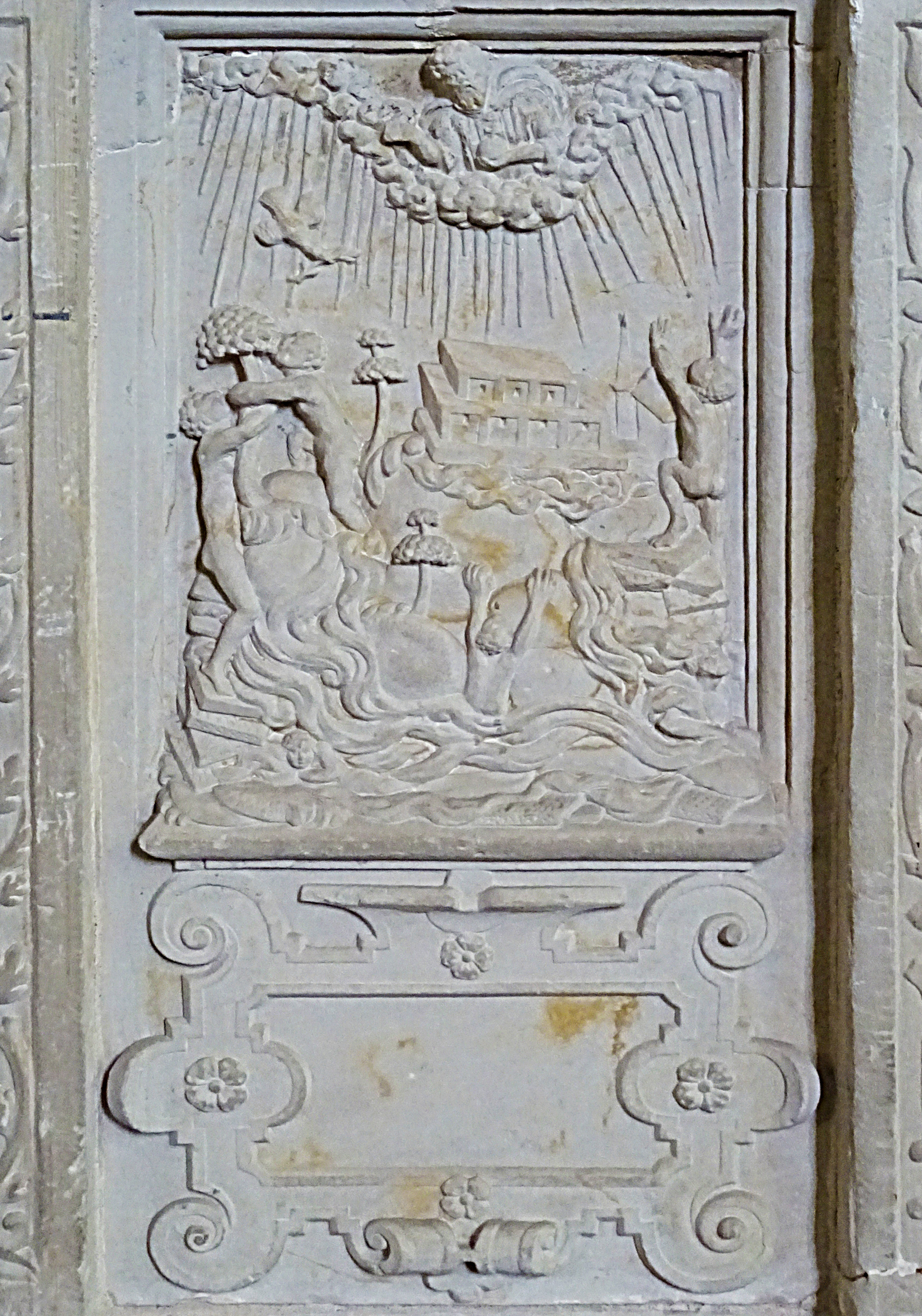 Steinbilderbibel in der St. Annenkirche (Eisleben), 06/29, Sintflut